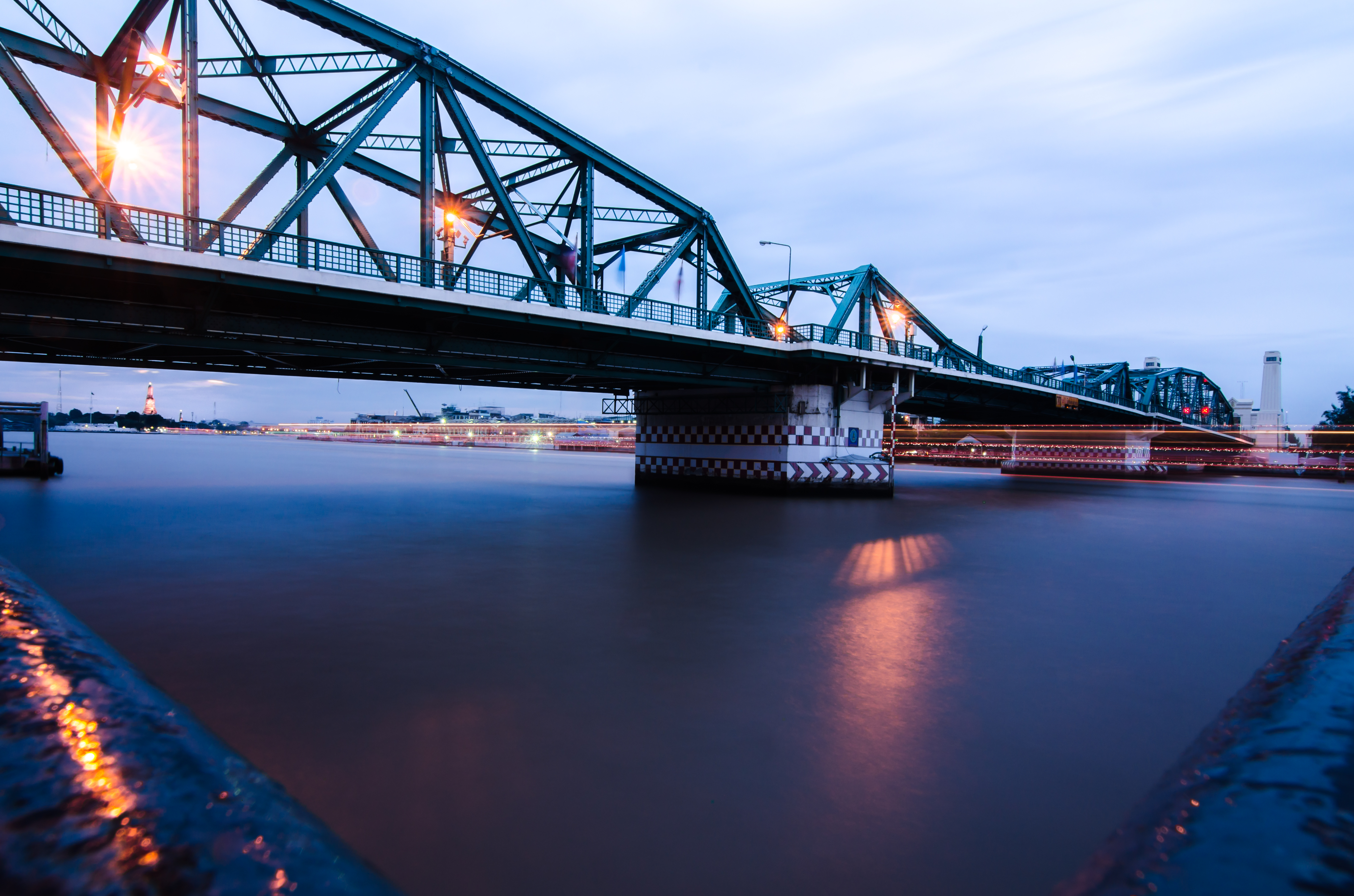 สายน้ำสงบนิ่งกับสพานที่โดดเด่นที่มีมาตั้งแต่โบราณ